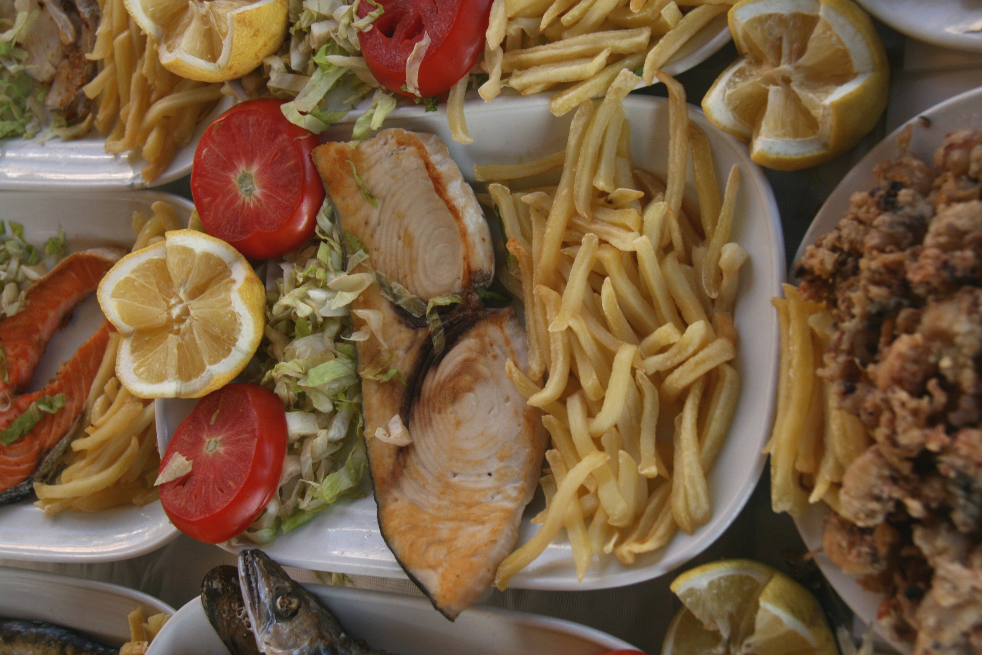 diversos pescados (entre ellos mero) y mariscos ...